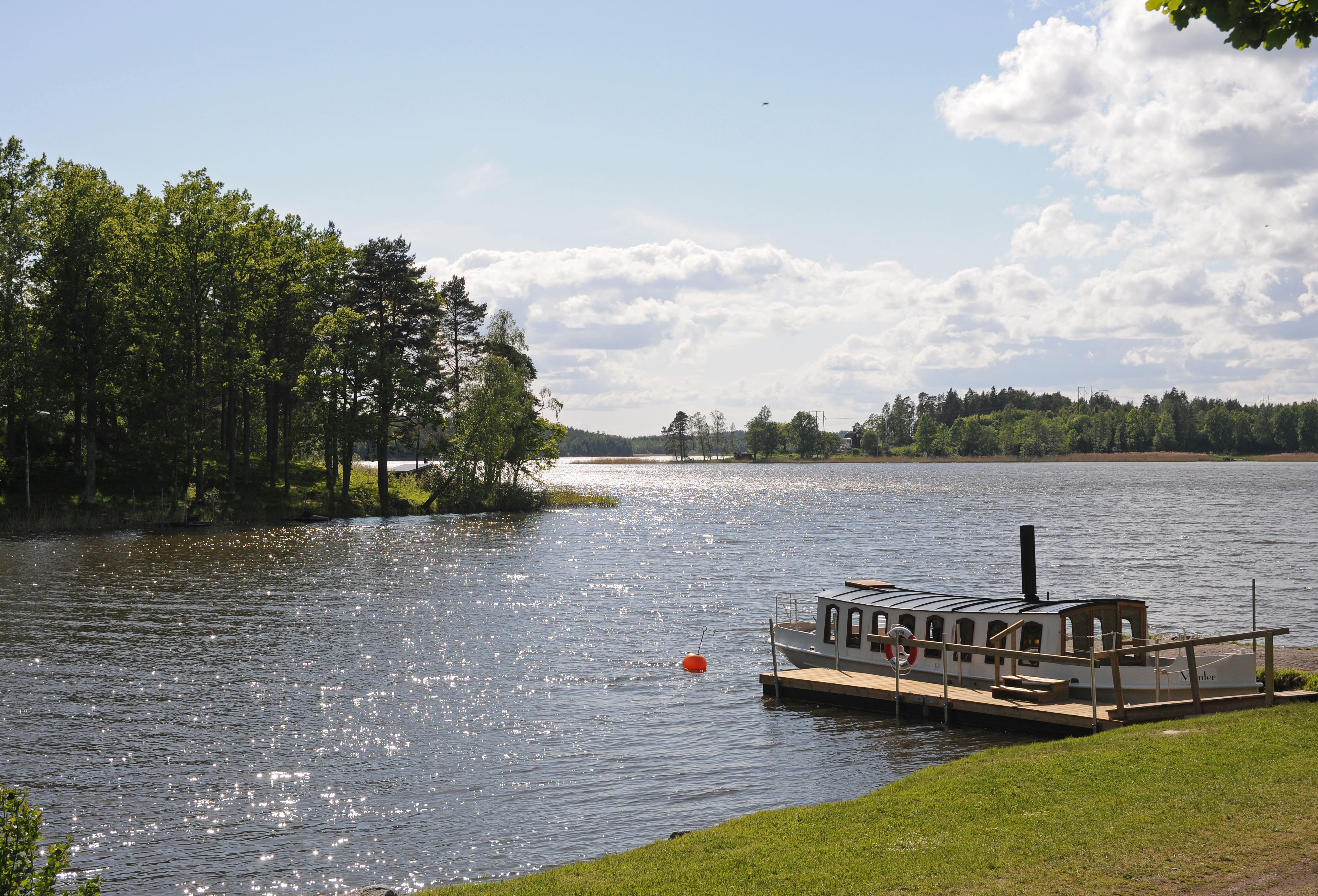 Hallbosjön vid Vrena i Nyköpings kommun